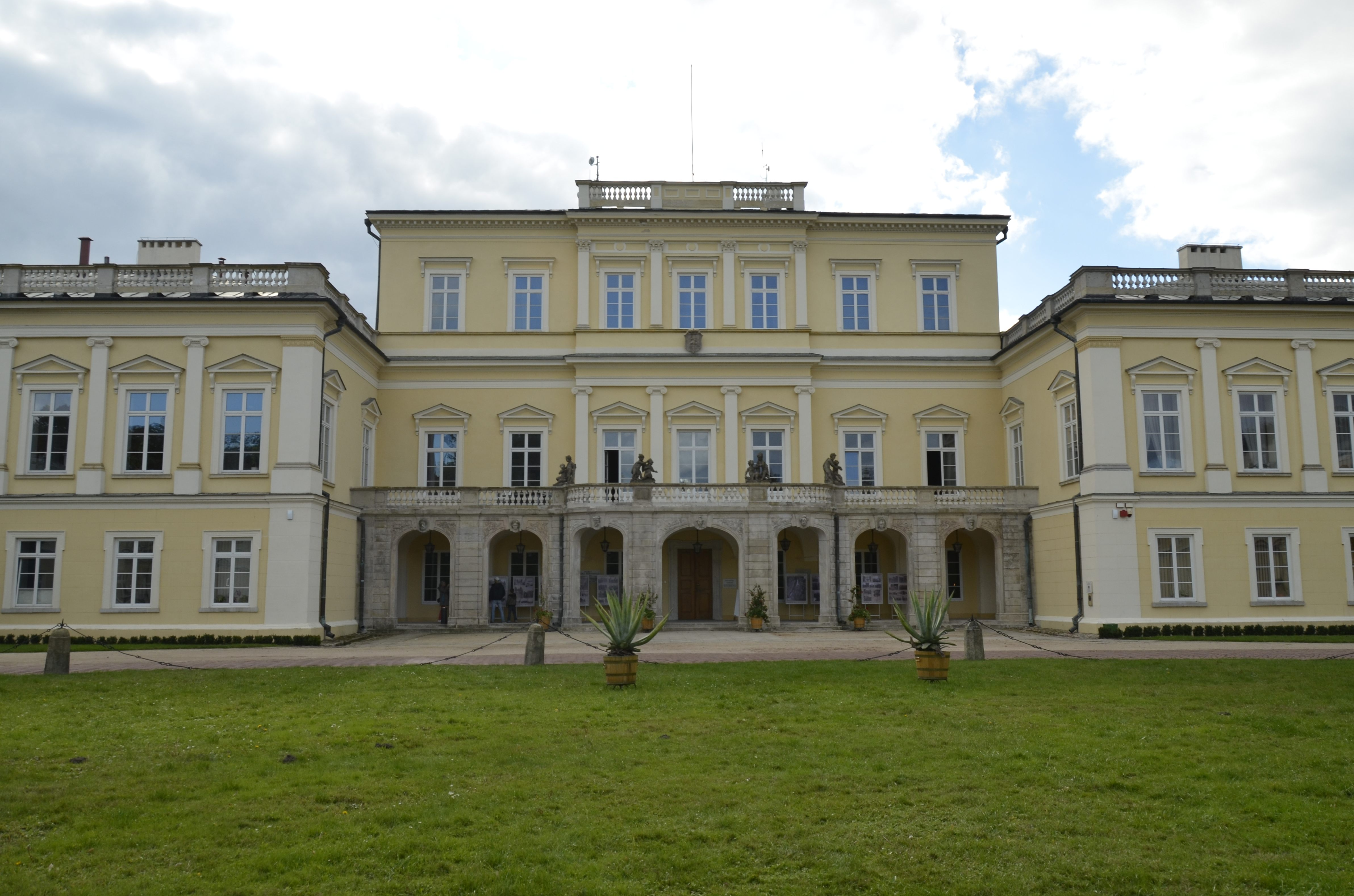 Puławy, pałac Czartoryskich, XVII, XIX